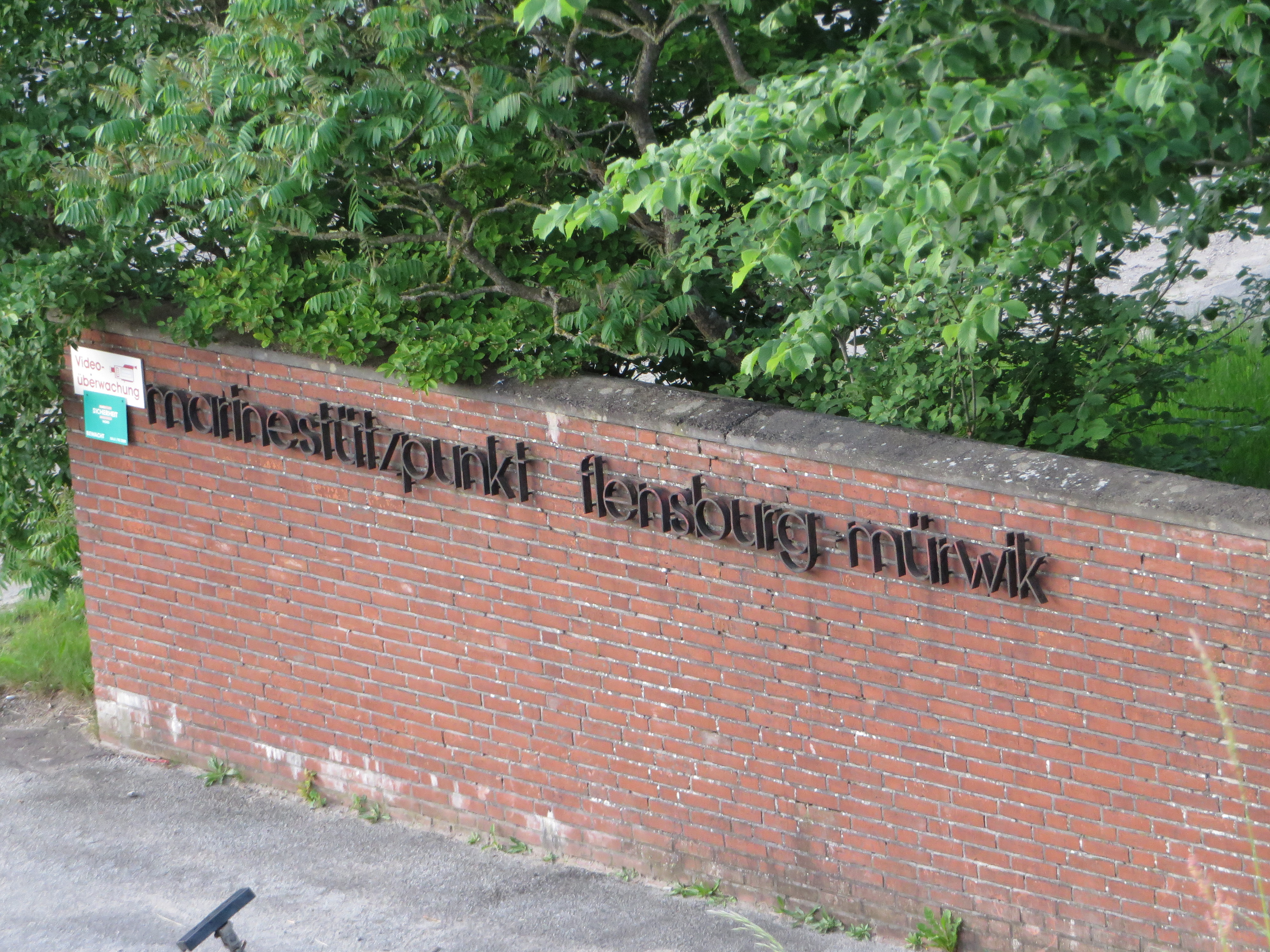 Schriftzug marinestützpunkt flensburg mürwik auf Mauer zu Sonwik, Bild 002